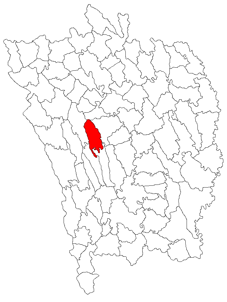 Categorie:Hărţi ale judeţului Vaslui